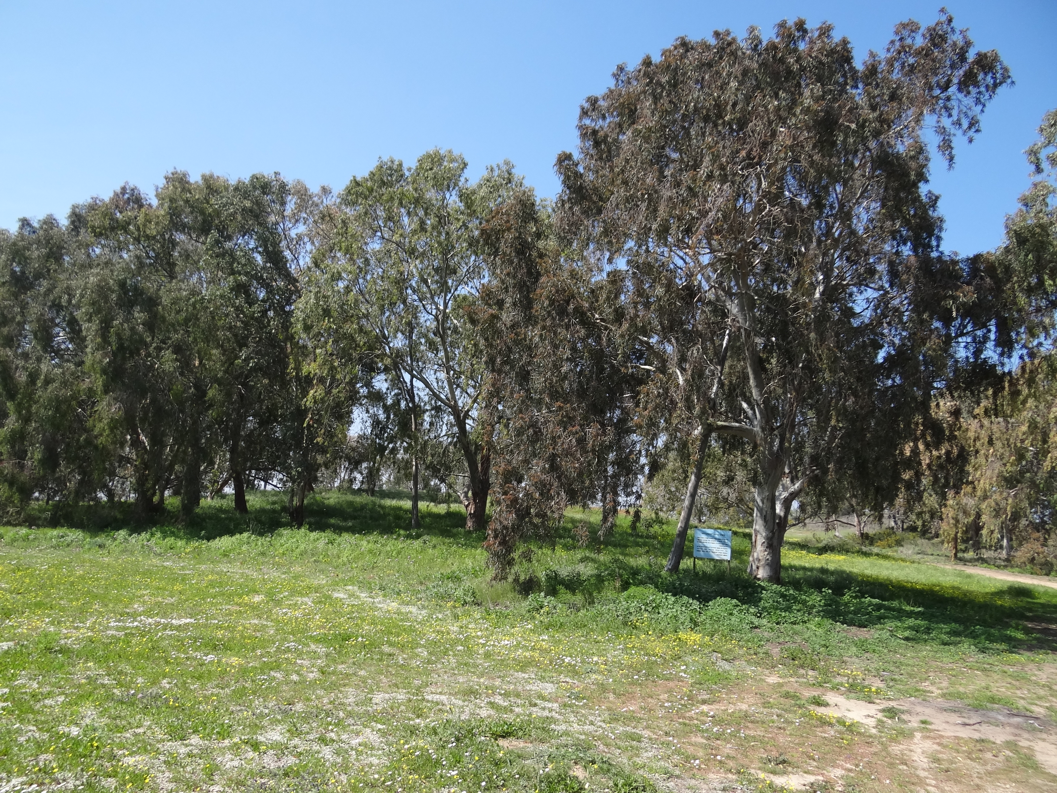 Gvar'am is a kibbutz in southern Israel גברעם הוא קיבוץ (הקיבוץ המאוחד) במישור החוף הדרומי ובמבואת הנגב. הגבעה ממערב לקיבוץ הנוכחי, מקום ההתיישבות הזמני בין השנים 1942-1945